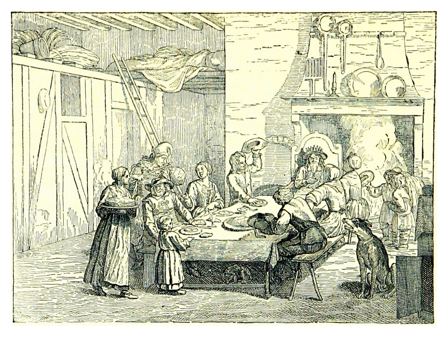 Scène d'intérieur. Famille de paysans attablée devant l'âtre pour célébrer la fête d'Epiphanie avec la traditionnelle galette des rois.